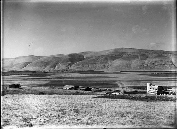 בית השיטה - מראה (פנורמה).